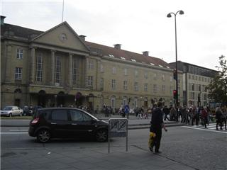 århus H